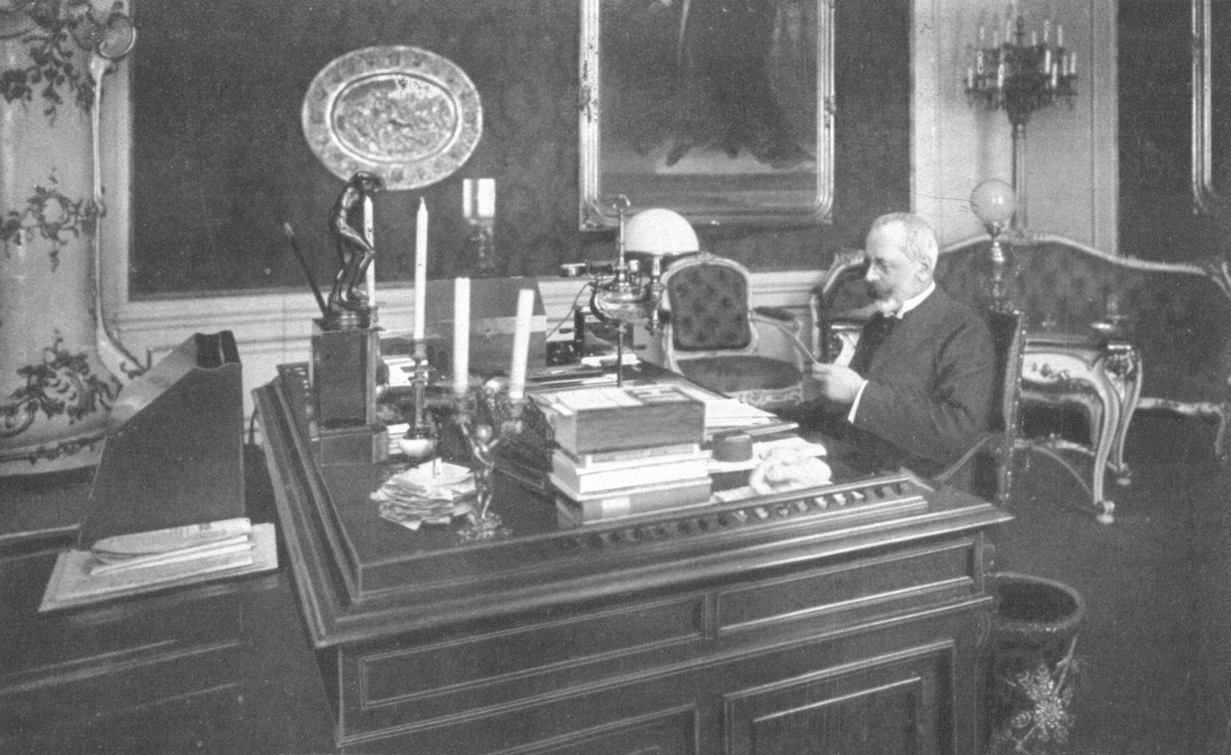 István Burián (Stephan Burián von Rajecz; 1852-1922), Hungarian politician